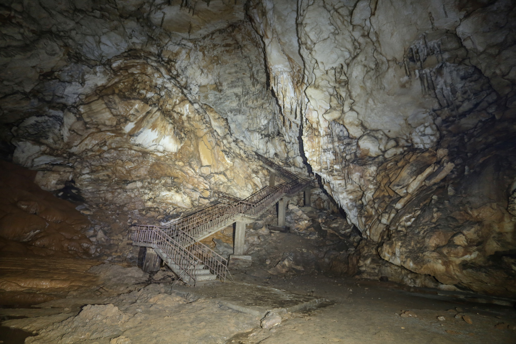 საწურბლიას მღვიმის ბუნების ძეგლი ღირშესანიშნაობა: ბუნების ძეგლი წარმოადგენს ბარემულ კირქვებში გამომუშავებულ სტალაქტიტებით, სტალაგმიტებით, ტრავერტინებითა და დიდი ზომის გურებით მდიდარ მდ. სემის მარცხენა სანაპიროზე მდებარე მღვიმეს. მღვიმის შესასვლელი იხსნება ასიმეტრიული ძაბრის ფსკერზე. შესასვლელის სიგანე 6 მეტრია, პირველ 80 მ სიგრძეზე, ფსკერი დახრილია 12-150 - ით. ბოლომდე ინვითარებს 1 - 1,5 მ სიღრმის საფეხურებს. შესასვლელიდან 125 მეტრში 5 მეტრიიანი ფლატეა, რომელსაც ებმის დიდი ზომის დარბაზი (30X25). შუასაუკუნეებში მღვიმეს იყენებდნენ თავშესაფრად. მდებარეობა: წყალტუბოს მუნიციპალიტეტი, სოფ. ყუმისთავის მიდამოები, მდ. სემის მარცხენა ნაპირი, 287 მეტრი ზღვის დონიდან. კოორდინატები: N42 23.283 E42 36.376